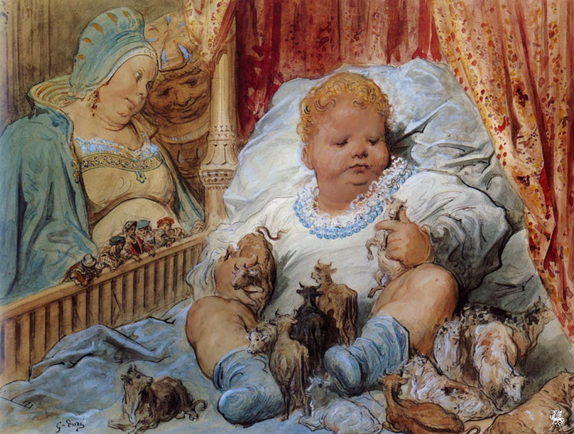 Gustave Doré (Strasbourg, 1832 – Paris, 1883) L’enfance de Pantagruel XIXe siècle, Vers 1873 Dessin à l’encre brune, aquarelle, crayon et gouache sur papier 36 x 47,8 cm Musée d'Art Moderne et Contemporain, Strasbourg Achat en 1992 [1]